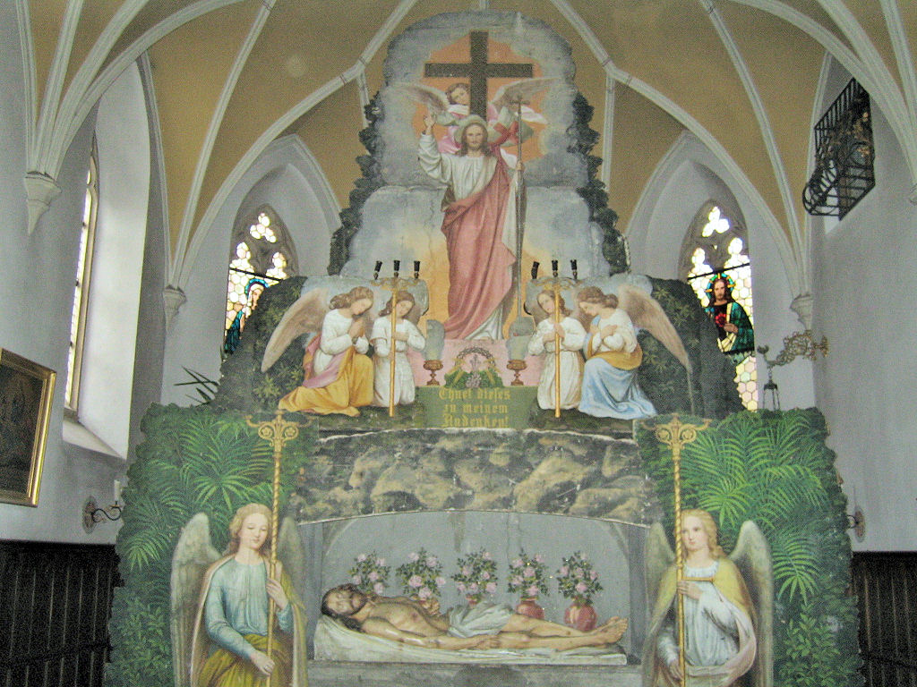 Haunzenbergersöll Heiliges Grab Pfarrkirche St, Johannes der Täufer Karfreitag Ostern Jesus Christus Auferstehung Engel Kreuz Kulisse